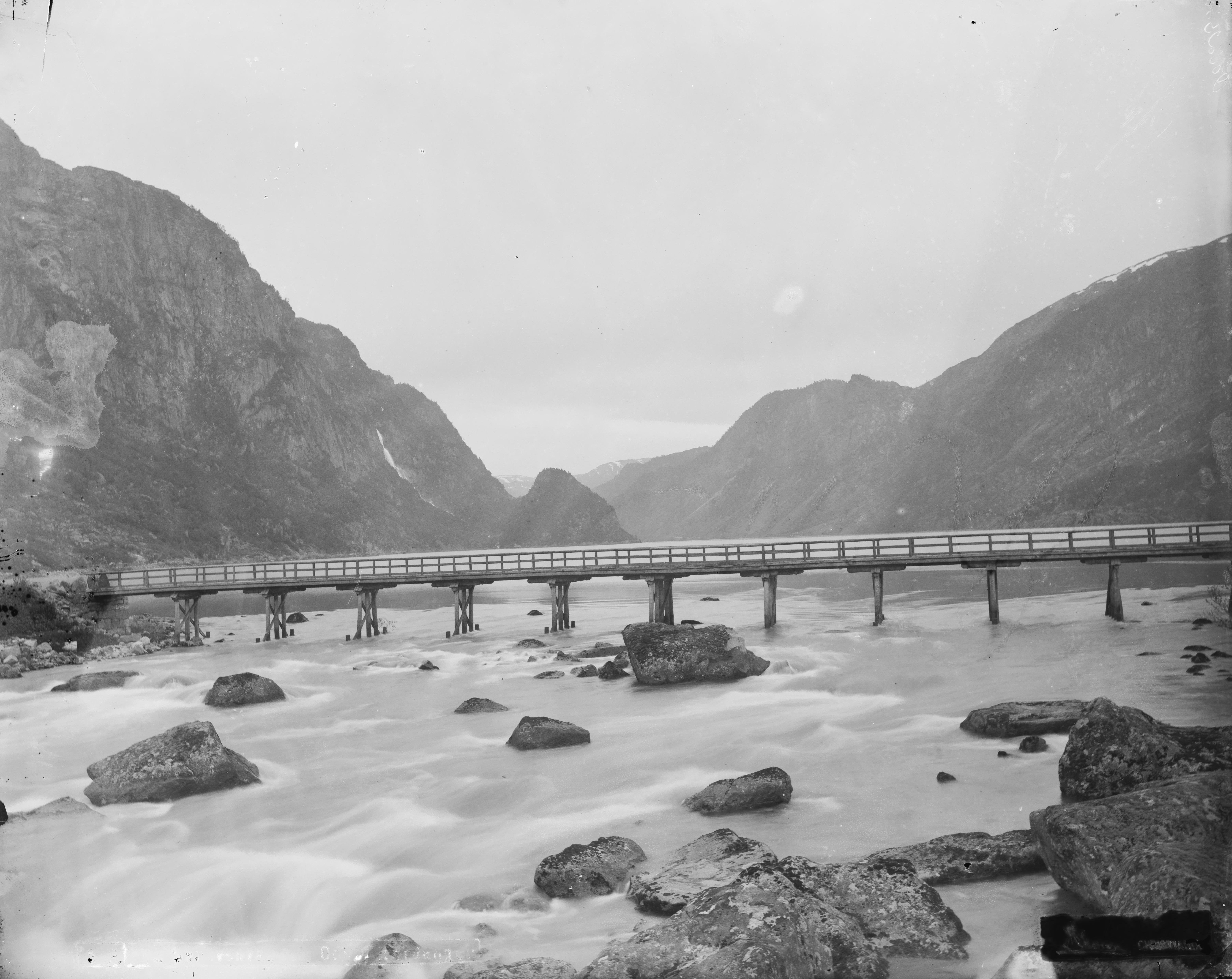 Den første Vasstunbroen, fullført i 1874. Revet og erstattet av ny bro 1892. Påskrift negativ: [Teksten er uleselig] Påskrift konvolutt: B276 Odda Vasstunbroen [Riksantikvaren] Sted: Vasstun Kommune: Odda Fylke: Hordaland Tagger: landskap bro Vasstunbroen elv